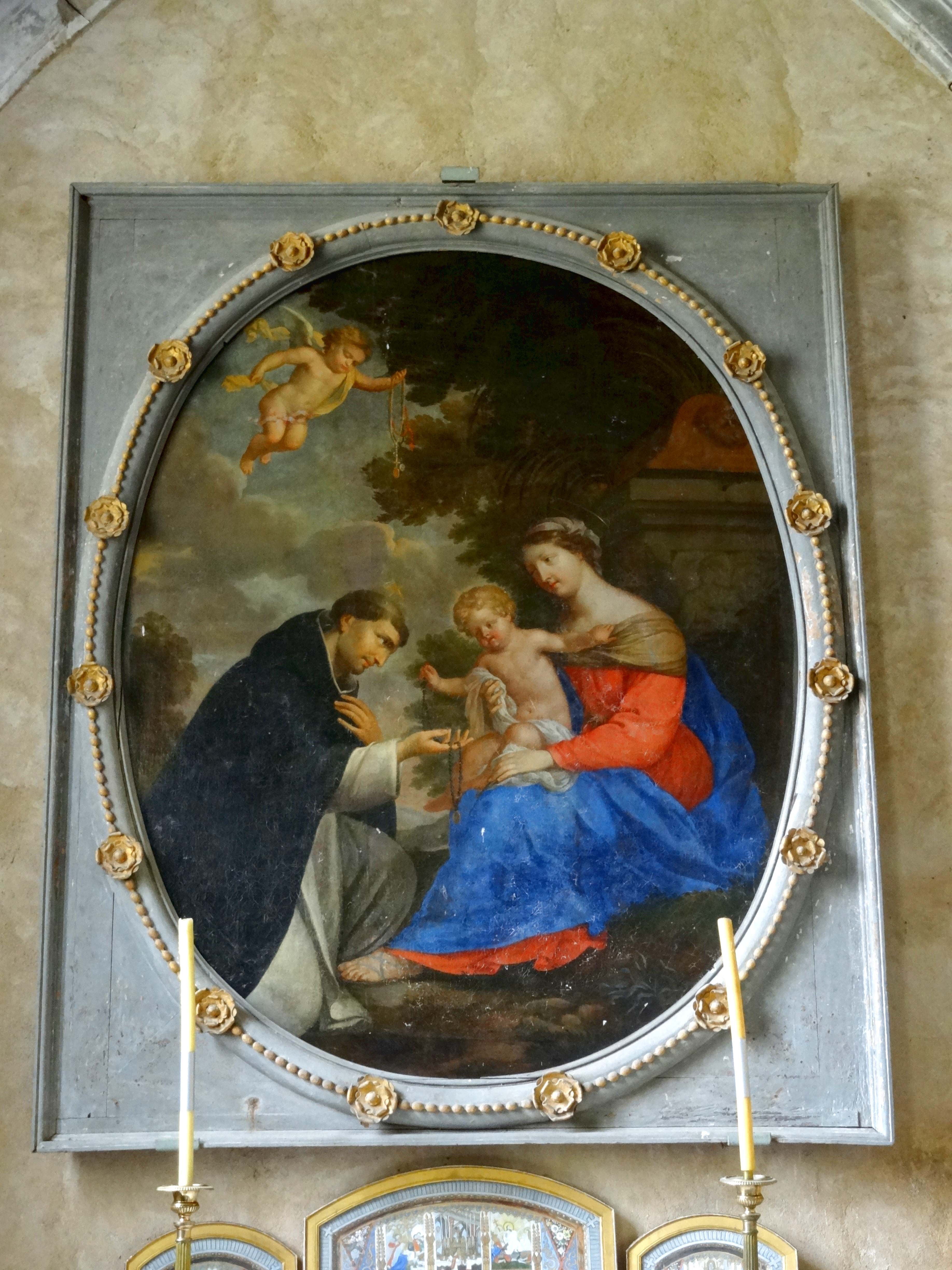 Mobilier de l'église - voir titre.